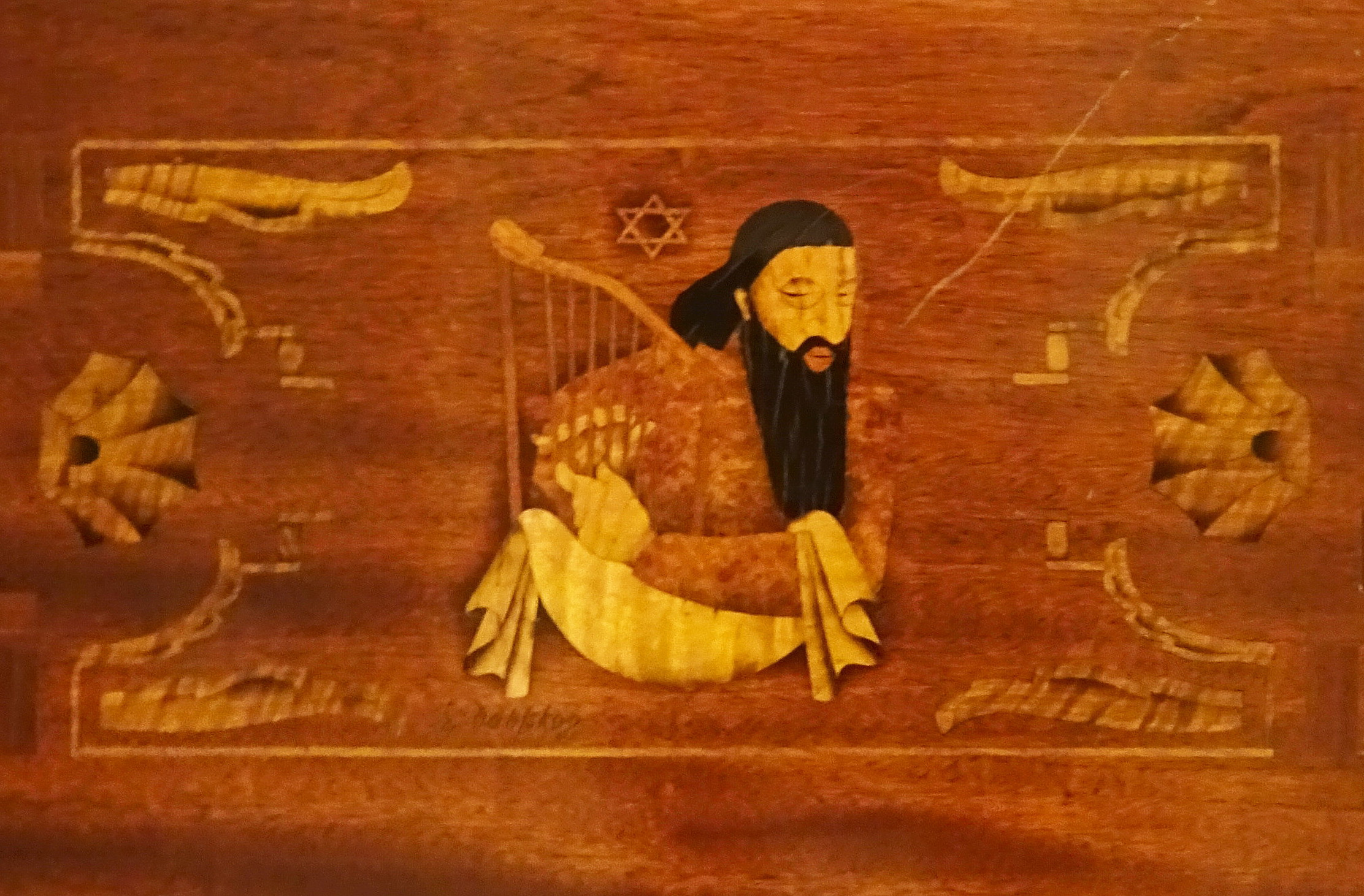 Konserthuset Stora Salen intarsia på dörrar